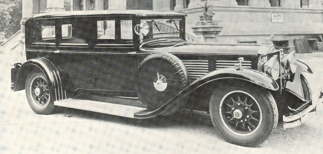 Gräf & Stift SP 8 Pullman (1931)